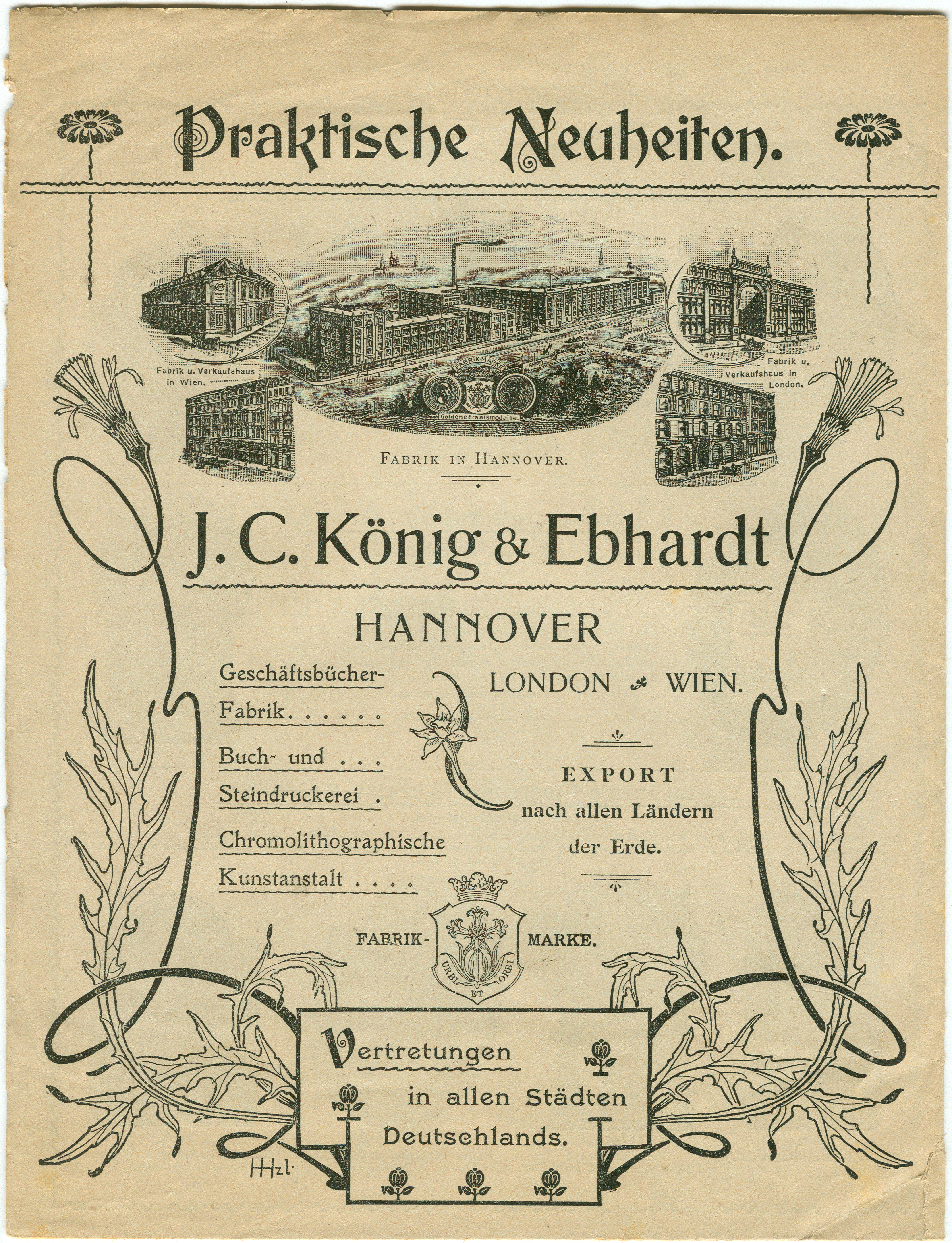 Titelseite eines 16-seitigen illustrierten Faltblattes/Ergänzungs-Prospektes in einfacher Ausführung auf dünnem Papier mit der Aufschrift: "Praktische Neuheiten. J. C. König & Ebhardt / Hannover London Wien. Fabrik und Verkaufshaus in Wien. Fabrik in Hannover. Fabrik und Verkaufshaus in London. Geschäftsbücher-Fabrik / Buch- und Steindruckerei / Chromolithographische Kunstanstalt. Export nach allen Ländern der Erde. Fabrik-Marke (mit URBI ET ORBI). Vertretungen in allen Städten Deutschlands. HHzl." (Monogramm von Hermann Hirzel, der die floralen Motive für dieses Reklameblatt gezeichnet hat)